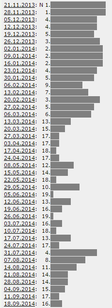 Trayectoria 20 Grandes Éxitos